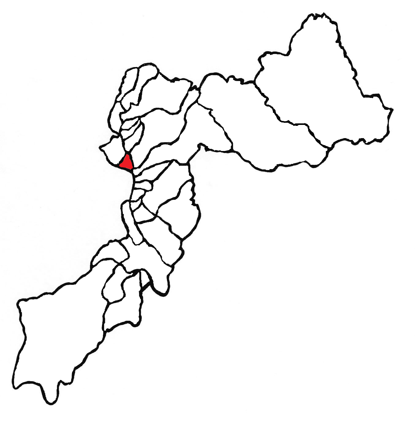 Ubicación del distrito en la provincia de Huancayo, departamento de Junín, Perú